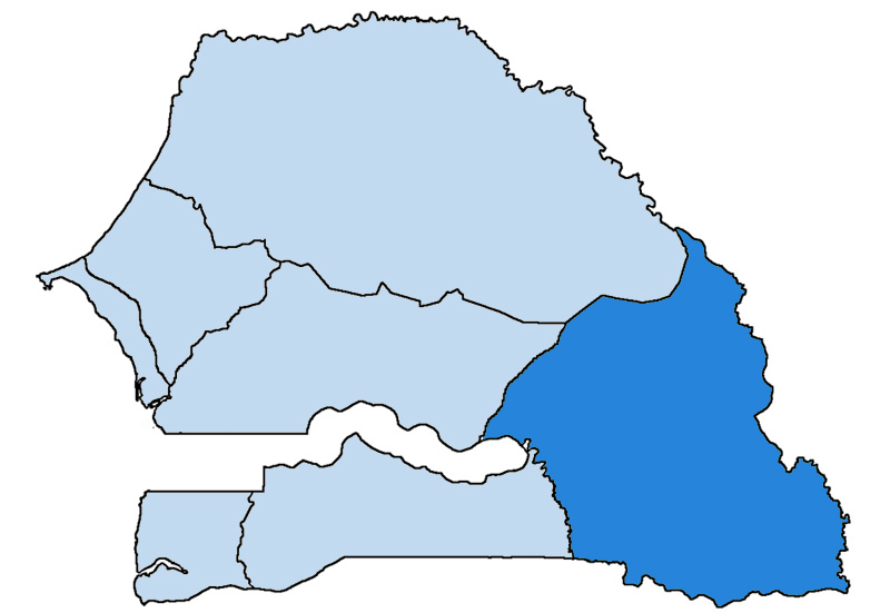 Mappa della diocesi cattolica di Tambacounda, in Senegal. Anno 2009.